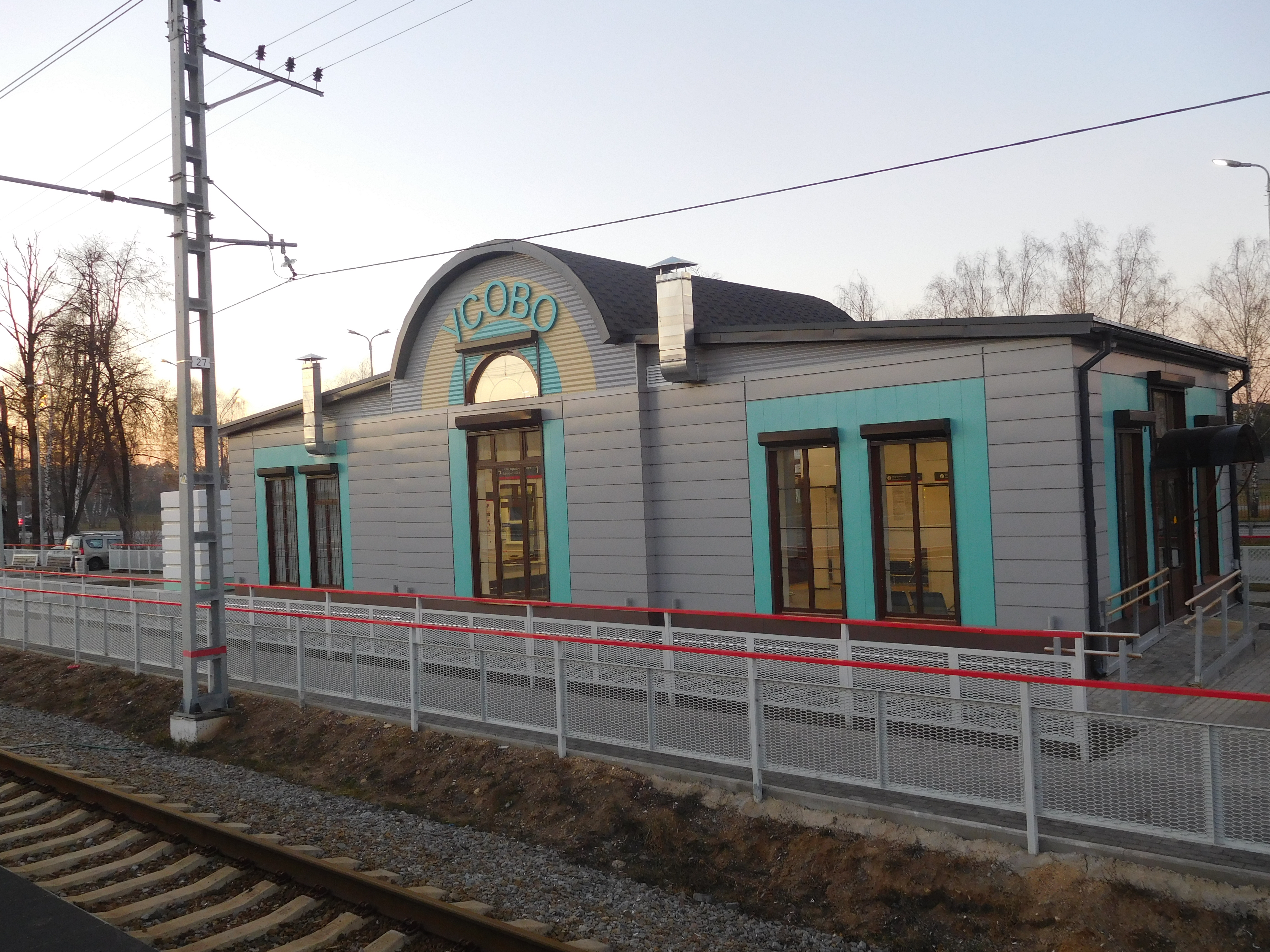 Вокзал станции Усово после реконструкции 2018